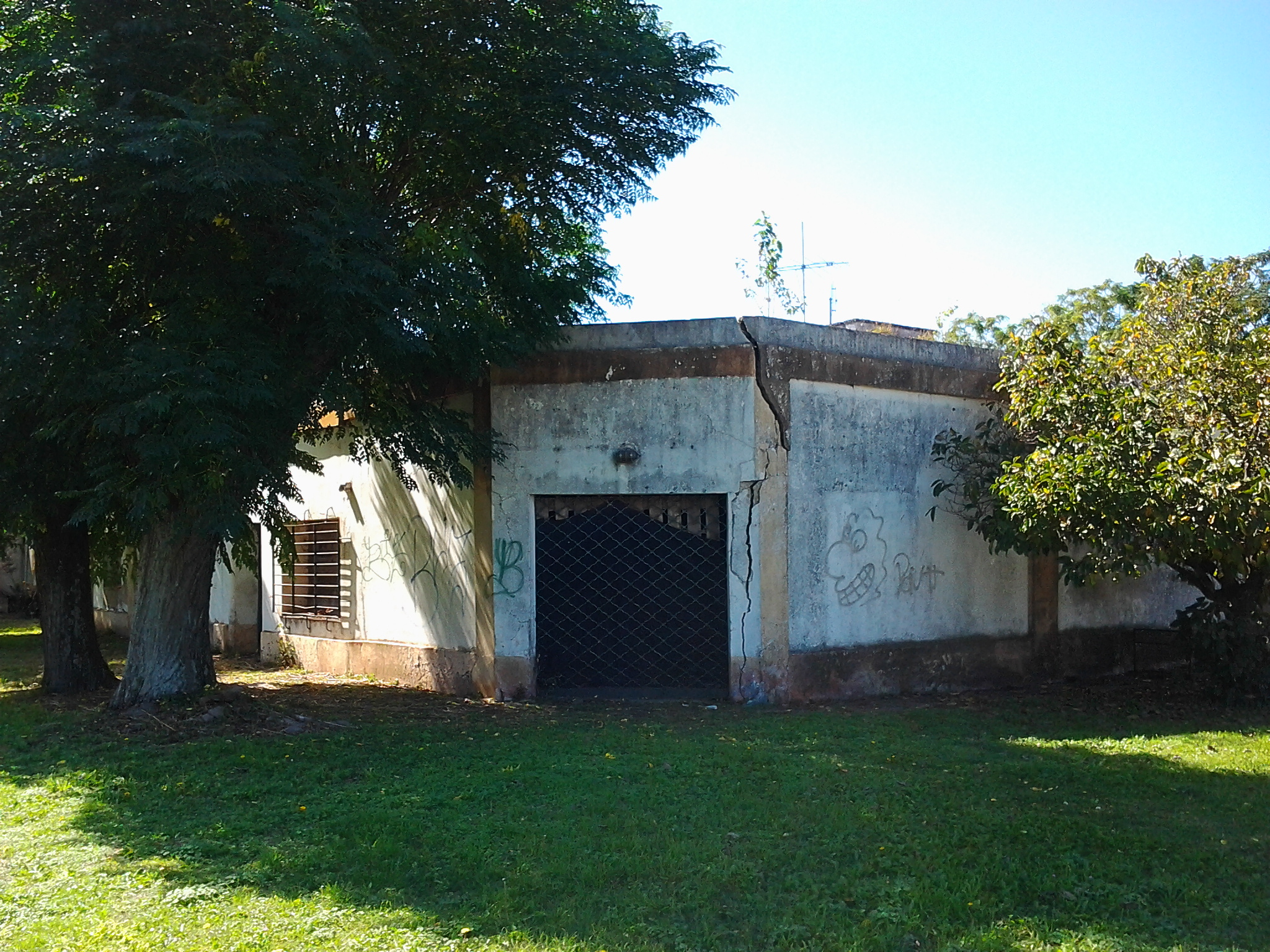 Antiguo Almacén de Ramos Generales en Zelaya Provincia de Buenos Aires